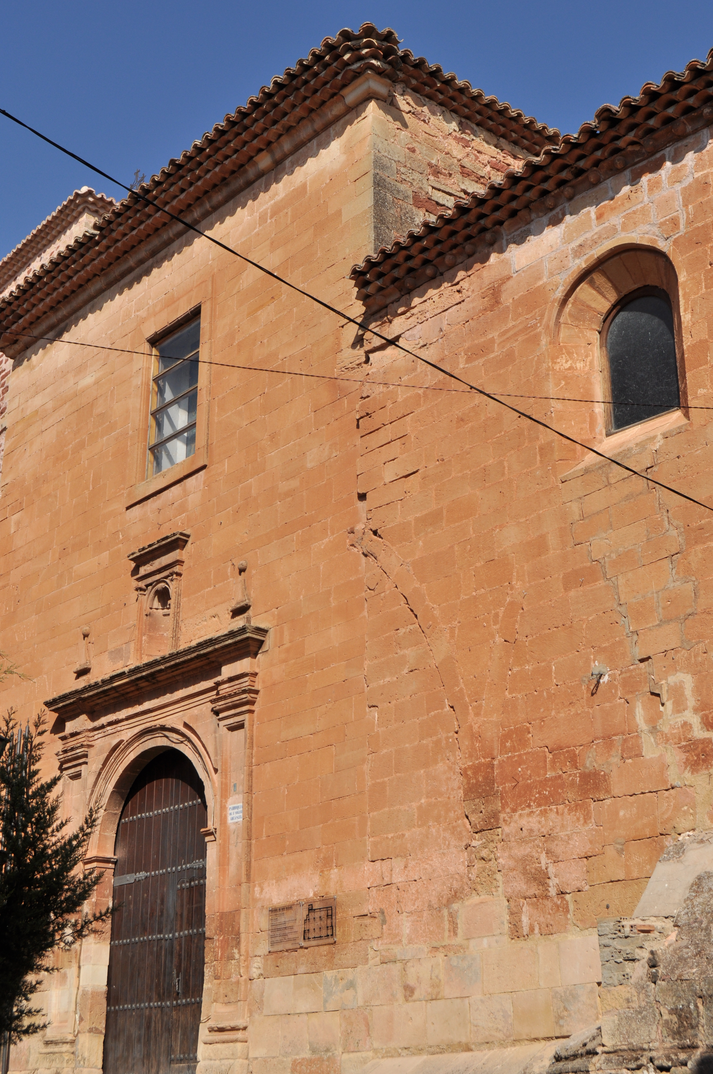 Alcaraz - 032